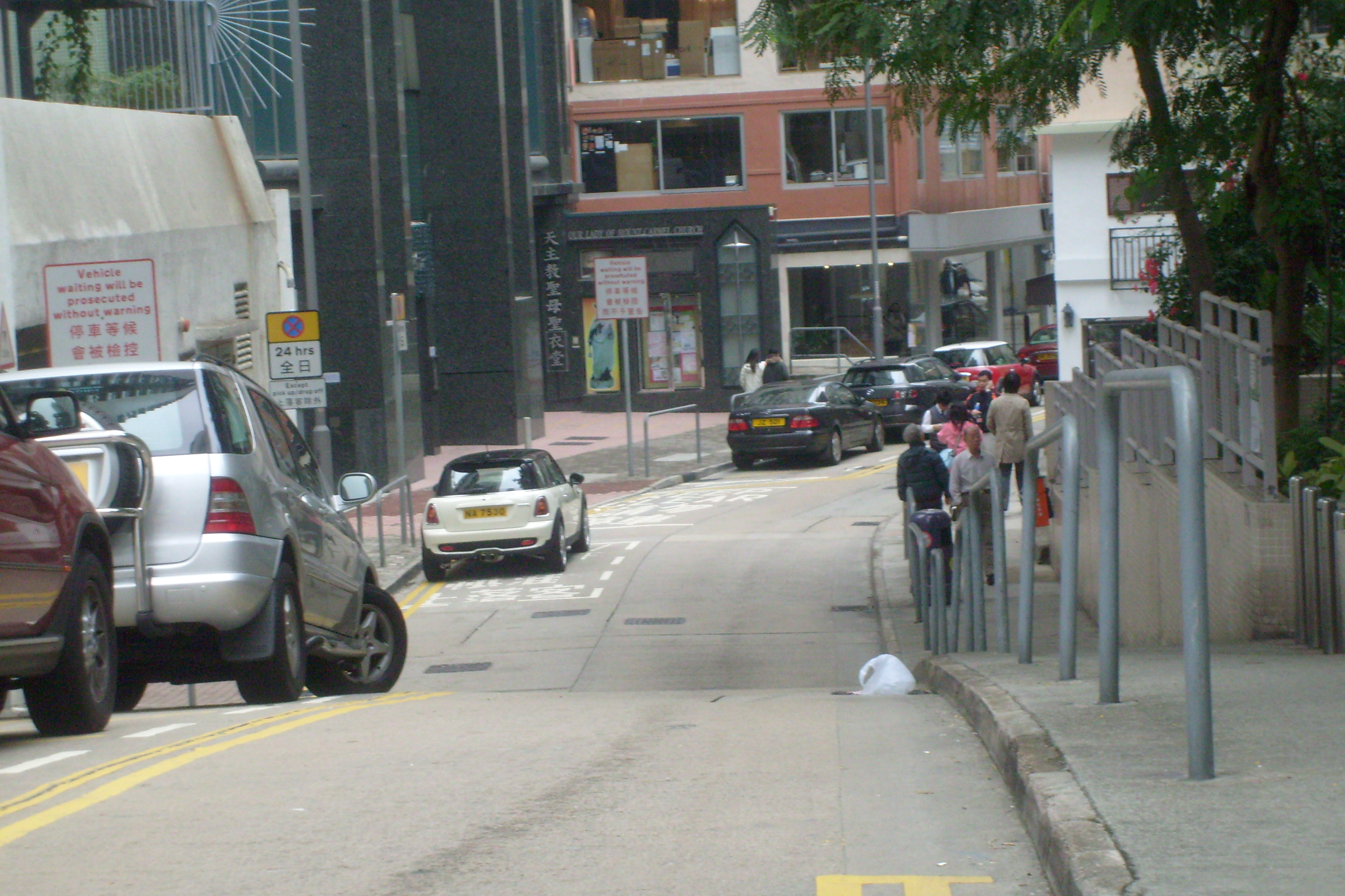 香港灣仔zh:星街